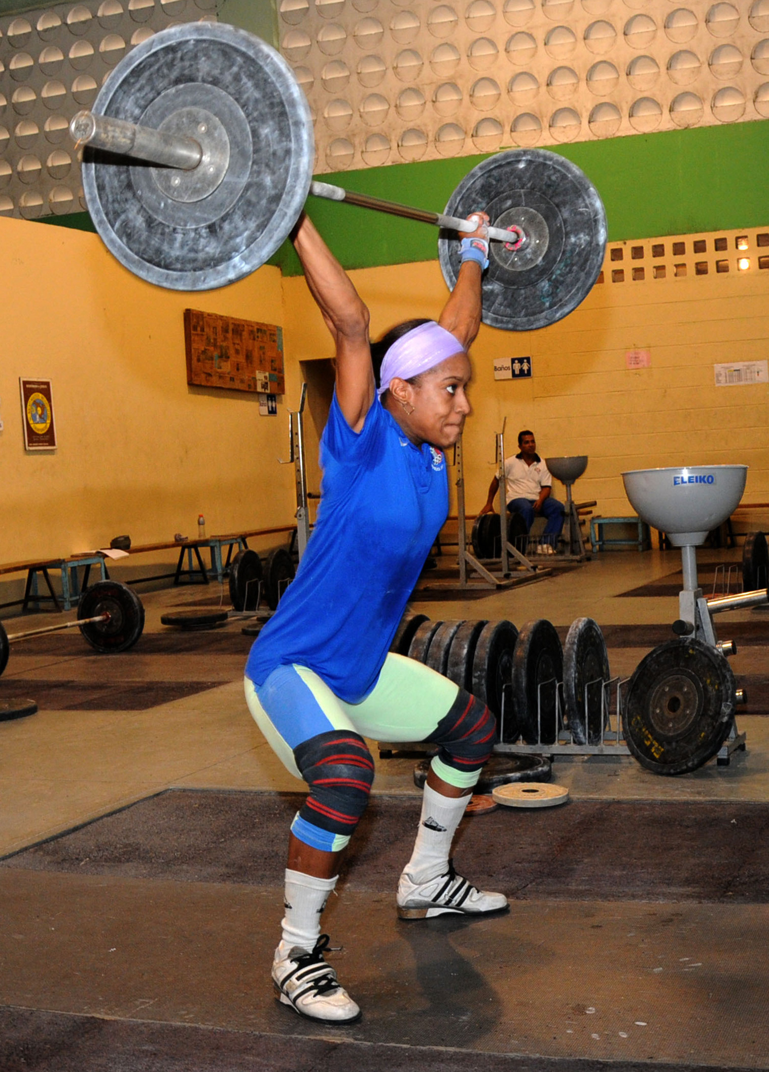 Entrenado